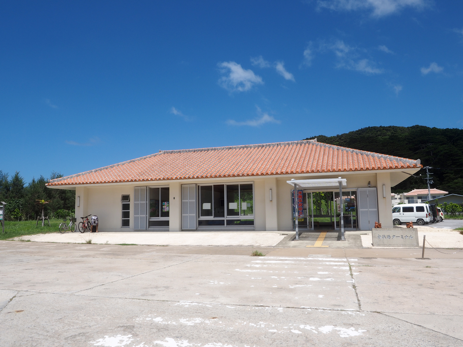 白浜港ターミナル（沖縄県八重山郡竹富町西表島）